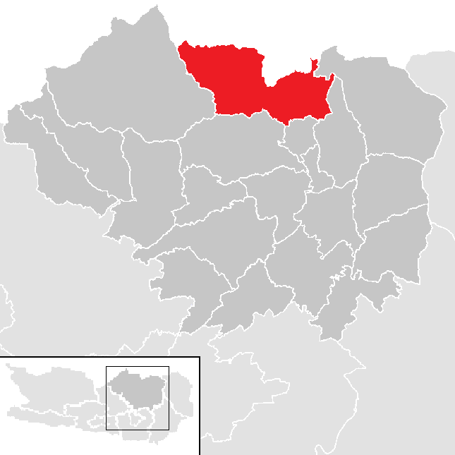 Bezirk Sankt Veit an der Glan